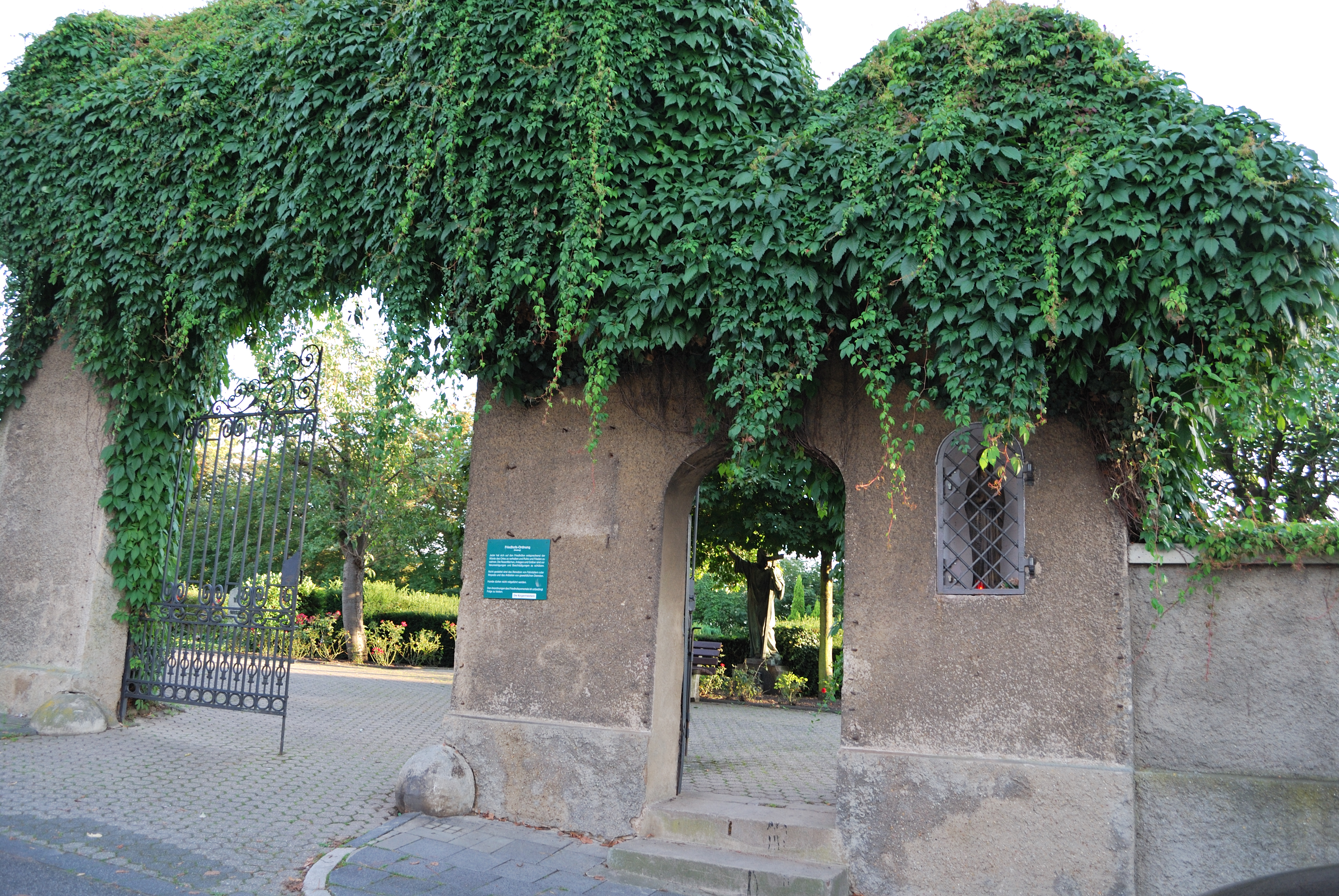 Friedhofstraße, Denkmalnummer 234